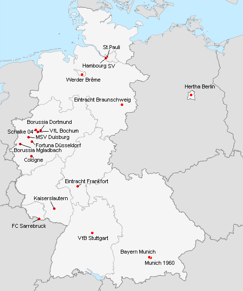 Répartition des clubs en 1.Bundesliga 1977-1978.